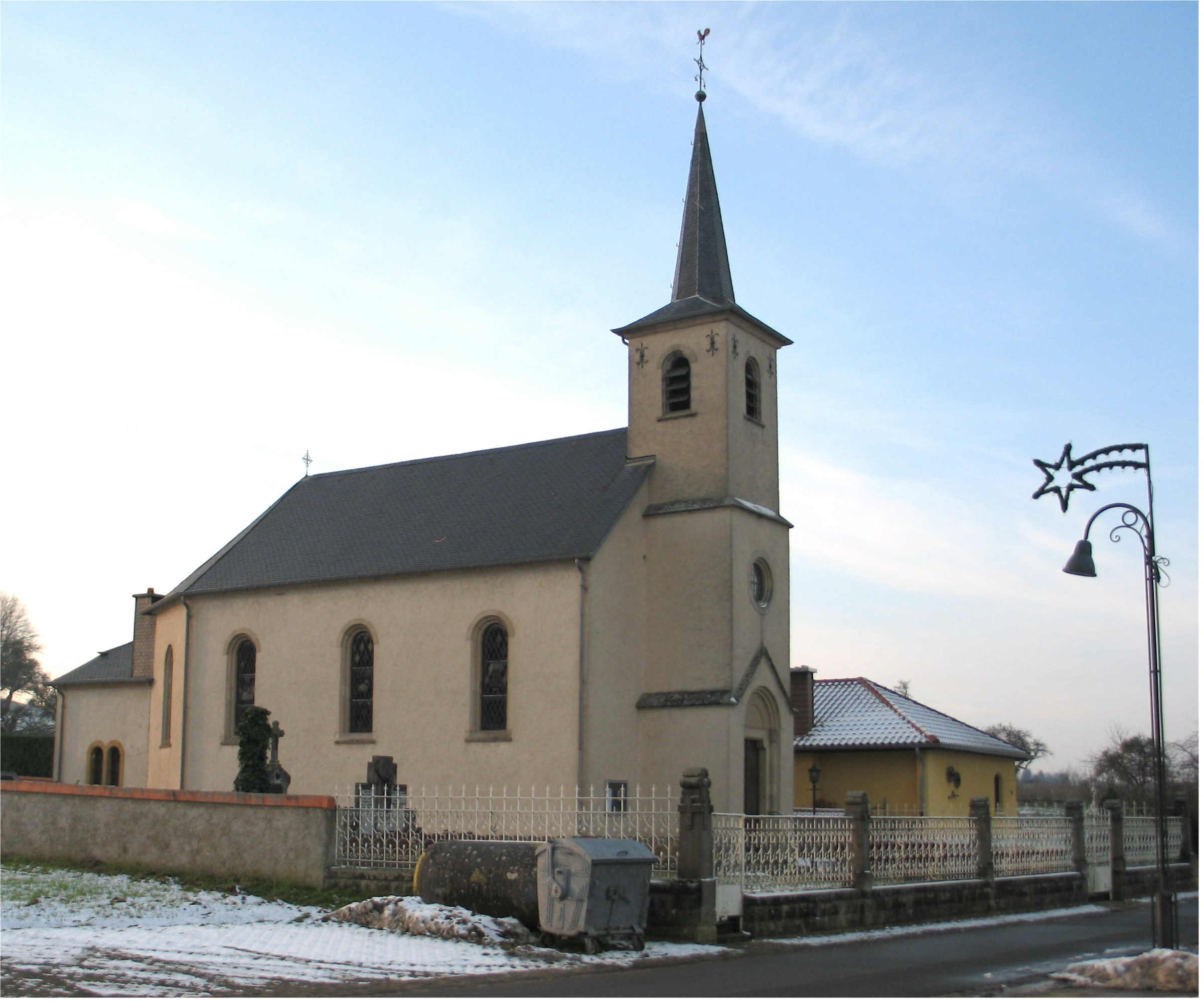 L'église de Medingen (Luxembourg)